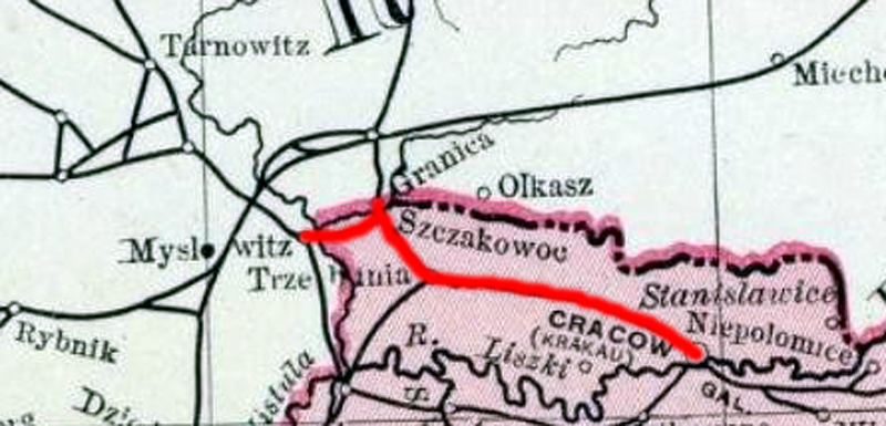 Streckennetz der Krakau-Oberschlesischen Eisenbahn basierend auf File:Galicia_1897_1.jpg